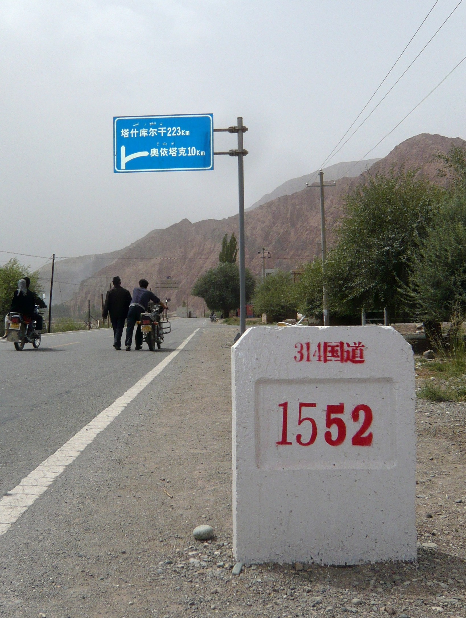 Karakorum-Highway, in China.